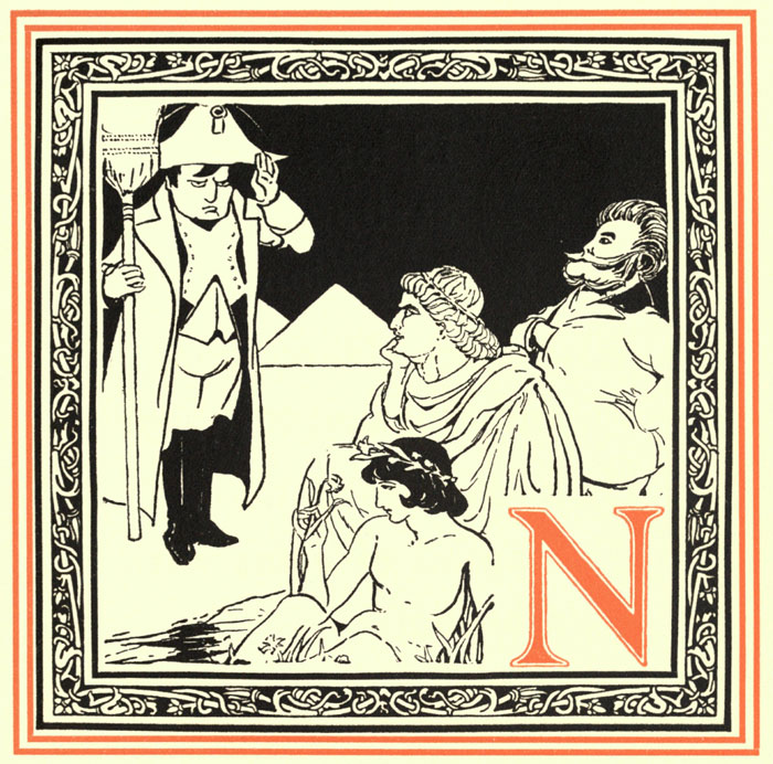 Oliver Herford, An alphabet of celebrities - N